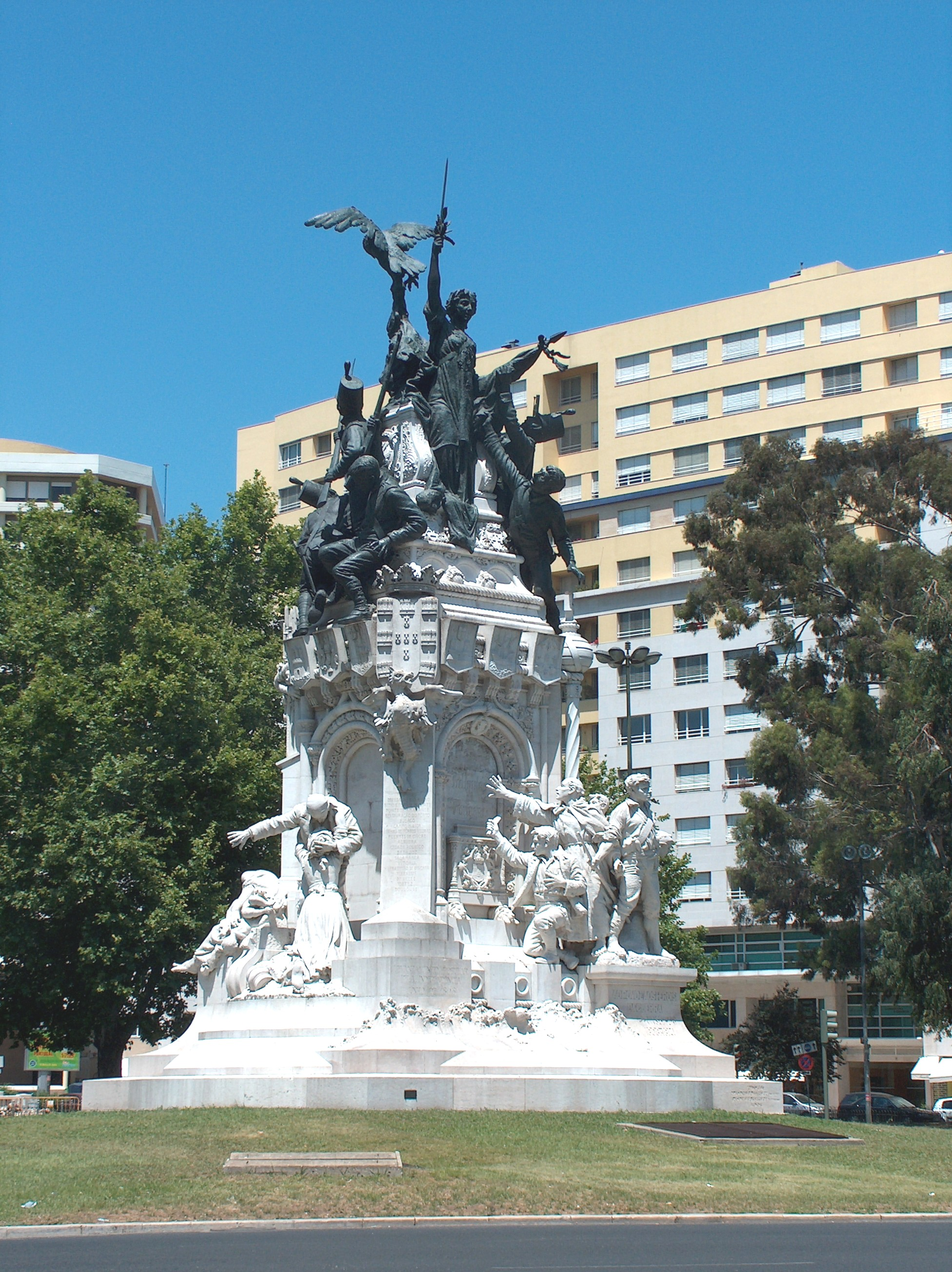 Monumento aos Heróis da Guerra Peninsular (Lisboa). Monumento aos Heróis da Guerra Peninsular, na Praça de Entrecampos em Lisboa, Portugal